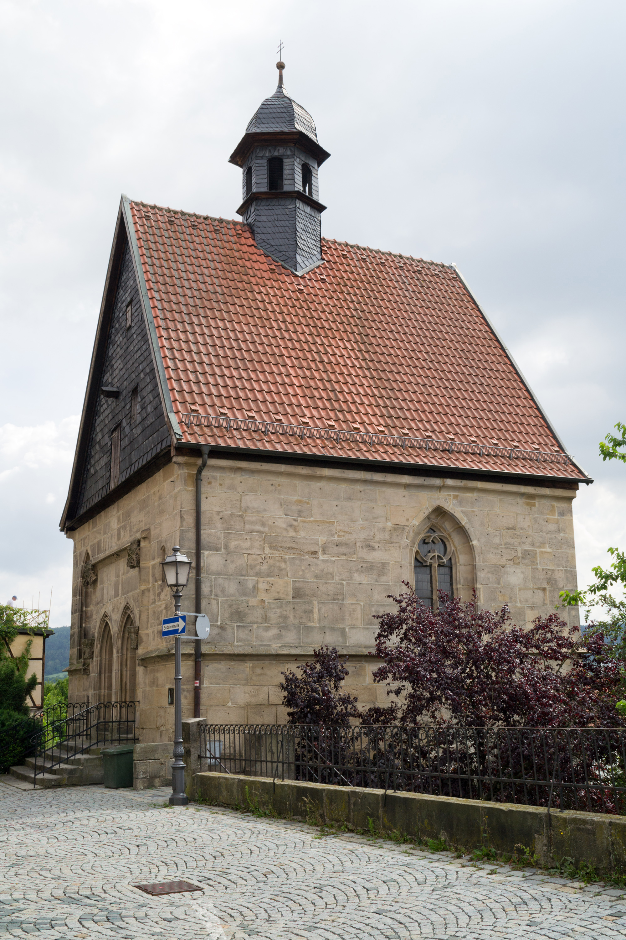 Kath. Annakapelle am Melchior-Otto-Platz 7 in Kronach